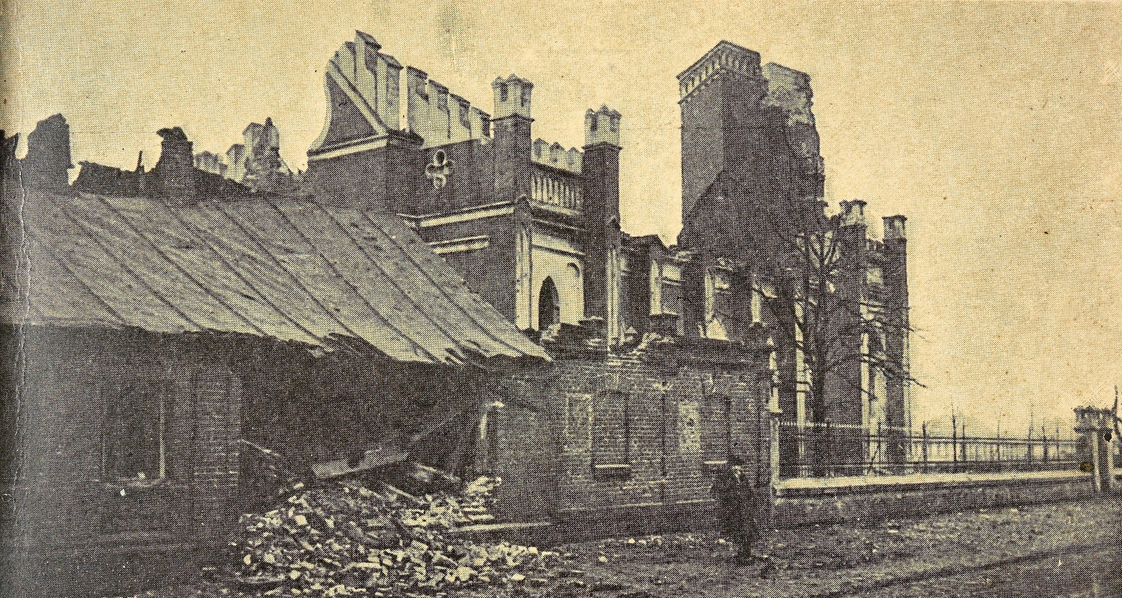 Tył kościoła rok 1914